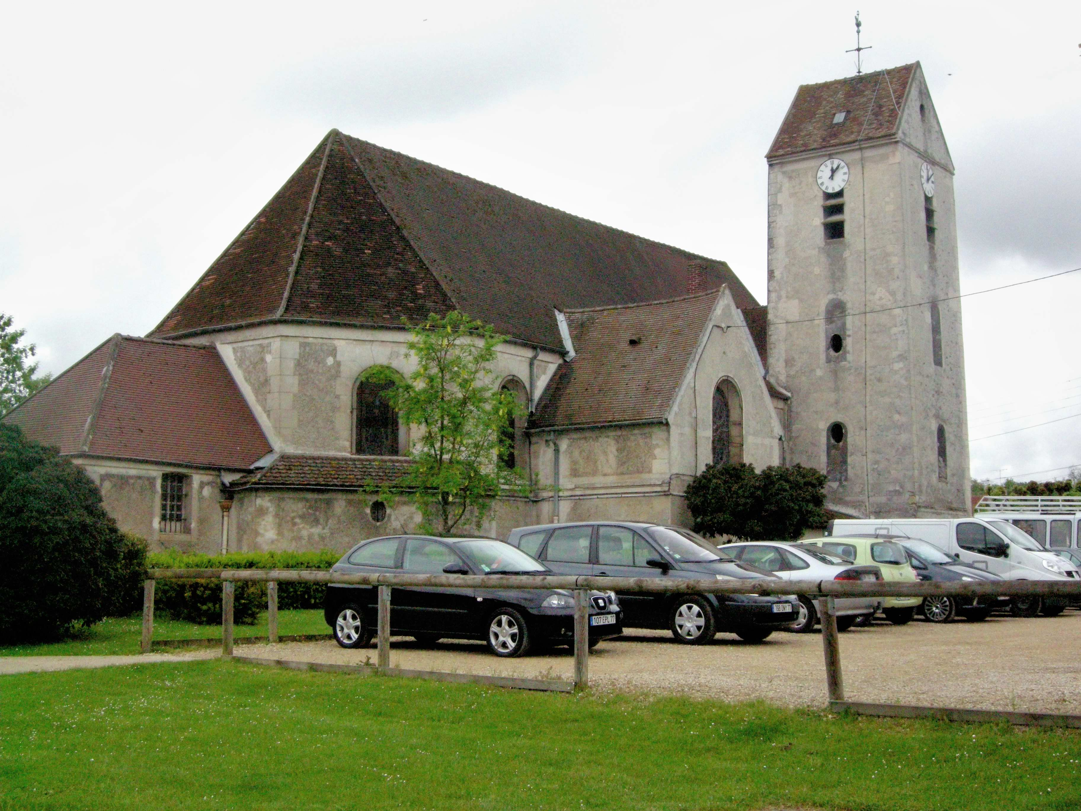 Église Sainte-Aldegonde de Villenoy. (département de la Seine-et-Marne, région Île-de-France).